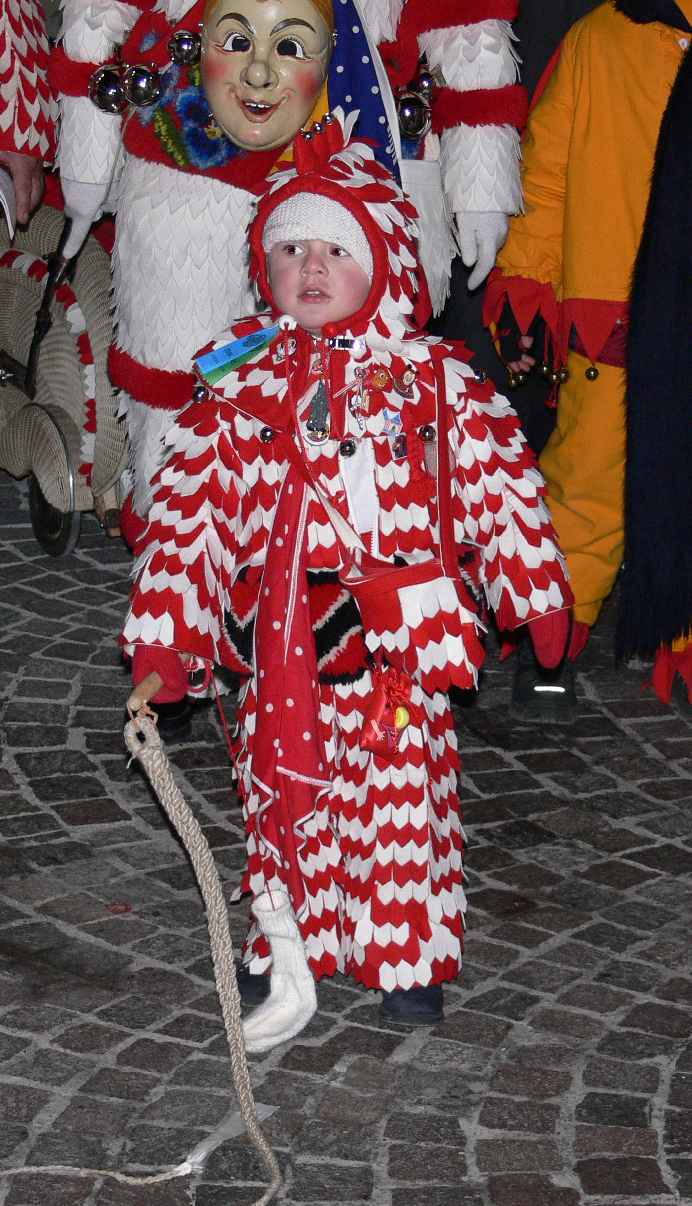 Kleiner Plätzler der Plätzlerzunft Weingarten (Flecklesumzug, VSAN-Landschaftstreffen Weingarten 2006)